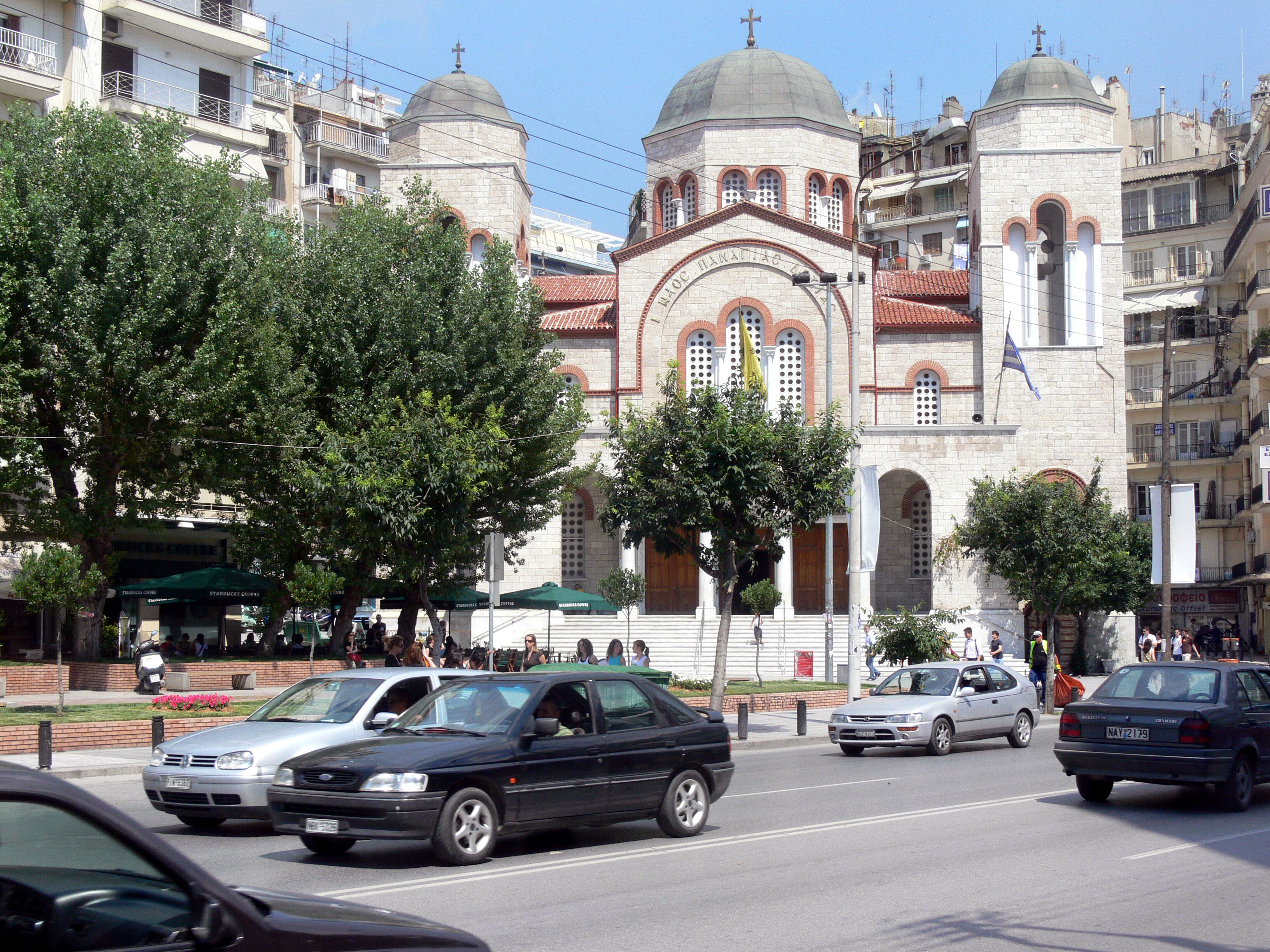 Thessaloniki. Verklärungs-Kirche